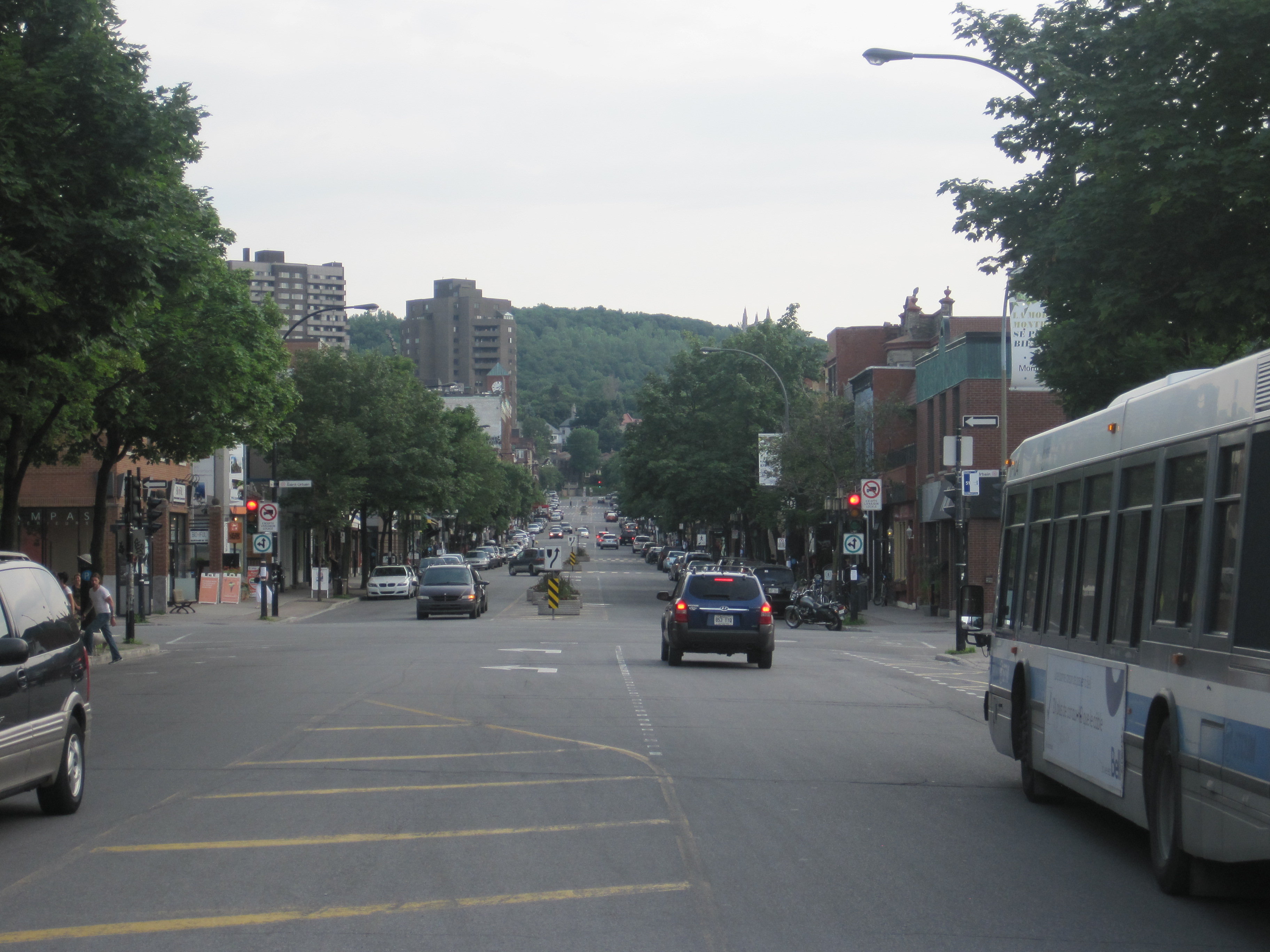 Avenue Laurier à Montréal, photo prise du Boulevard Saint-Laurent en direction ouest